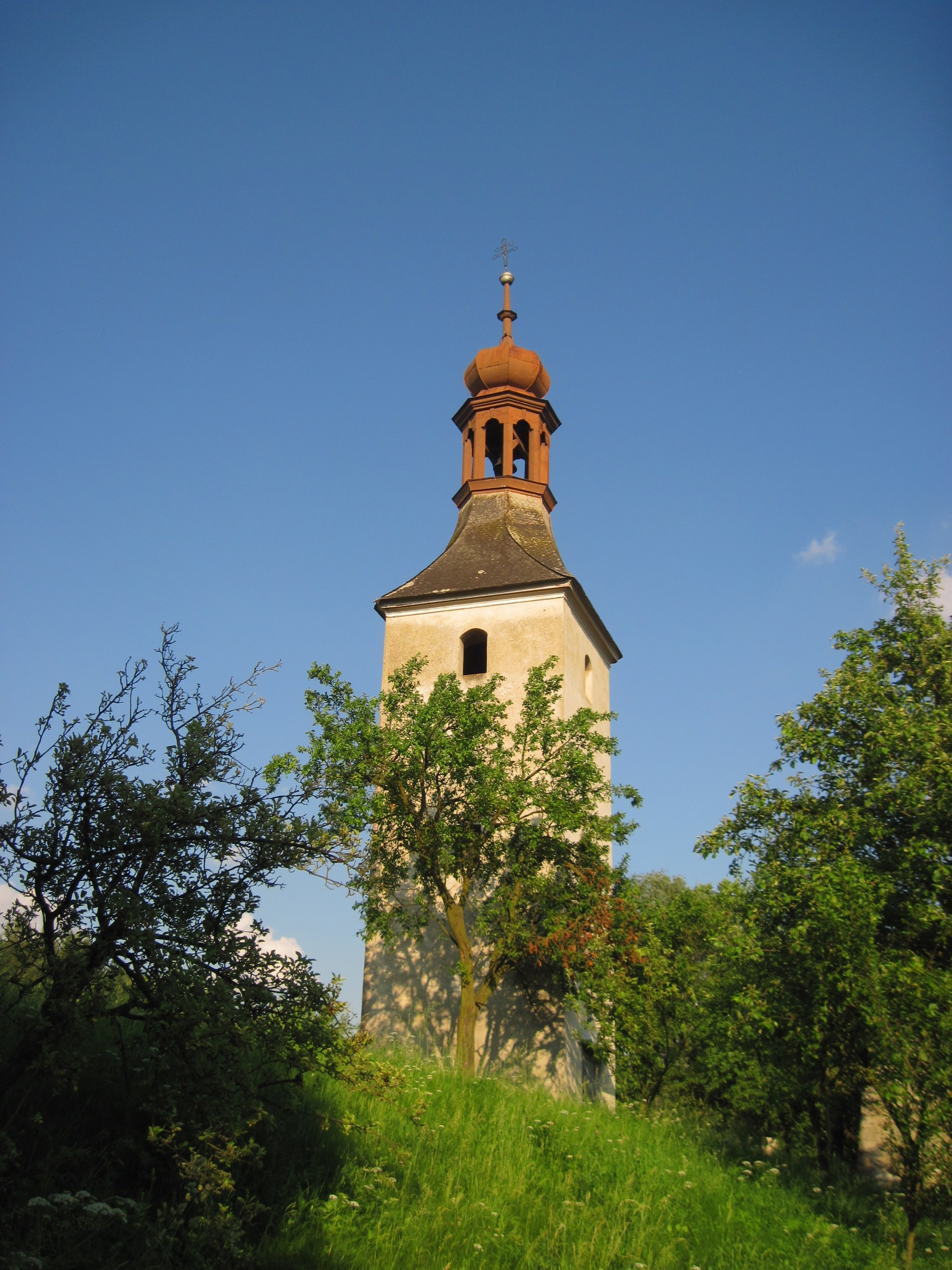 zvonice